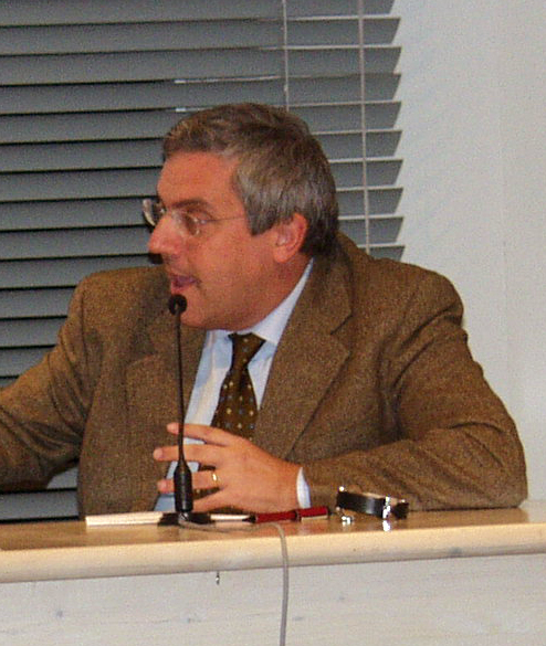 A sinistra don Vinicio Albanesi, presidente della Comunità di Capodarco, e, a destra, Carlo Verna, neosegretario dell'Usigrai, il sindacato dei giornalisti Rai